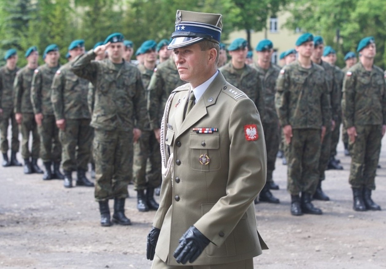 Stargard. płk Dariusz Górniak